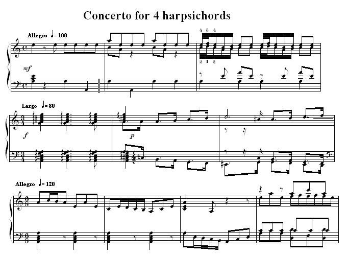 Тема концерта для 4 клавиров ля минор